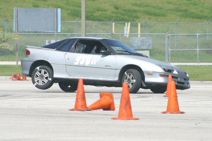 1990 Isuzu Geo Storm GSi hatchback in autocross